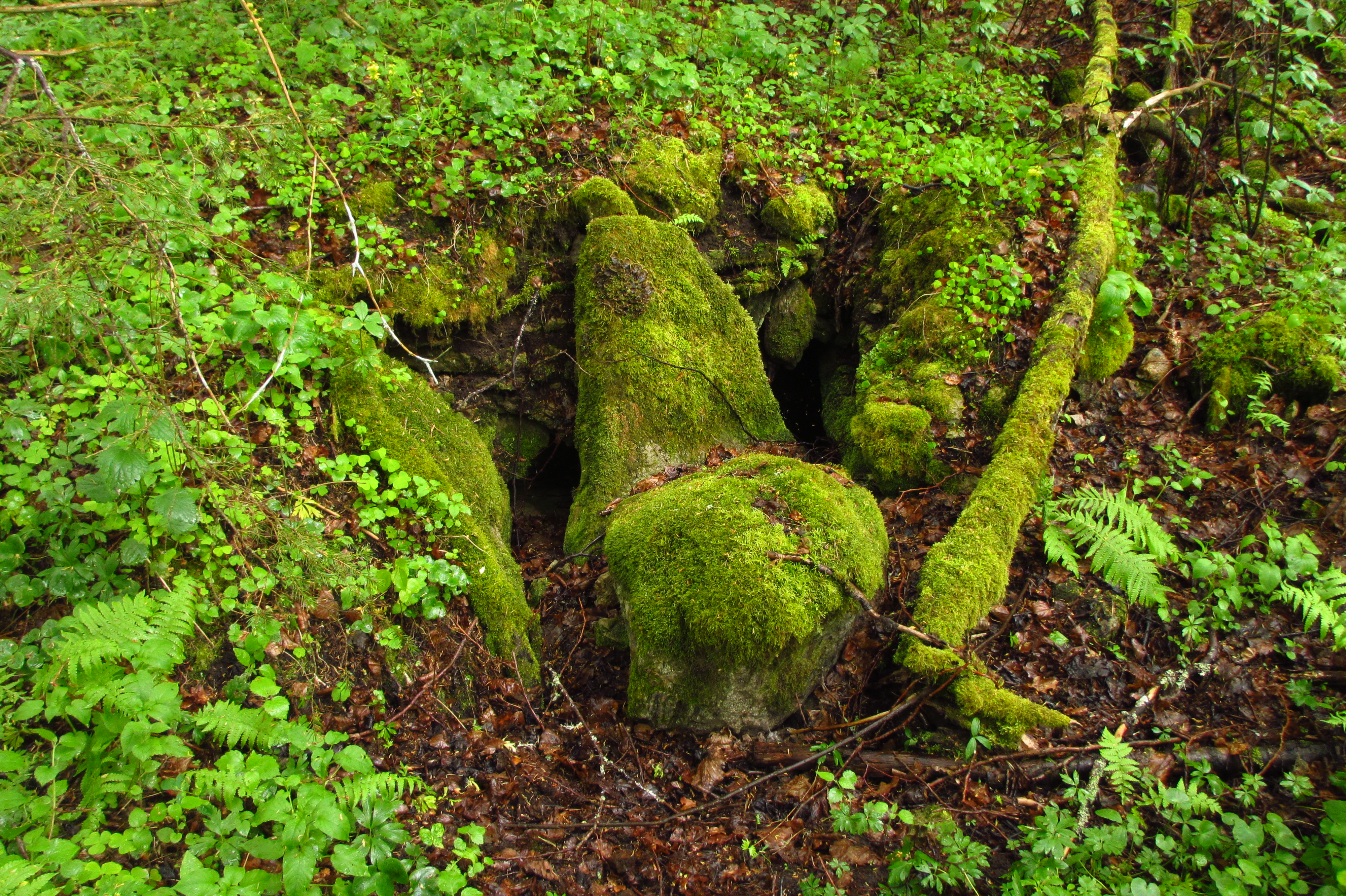 Kurisu Kalme karstialal Lahemaa rahvuspargis